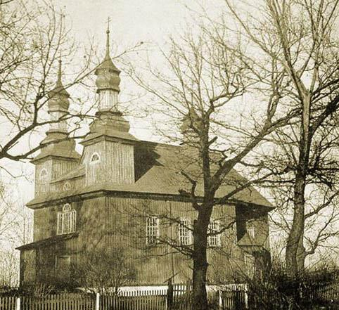 Беларуская (тарашкевіца): Валавель (Valaviel). Царква